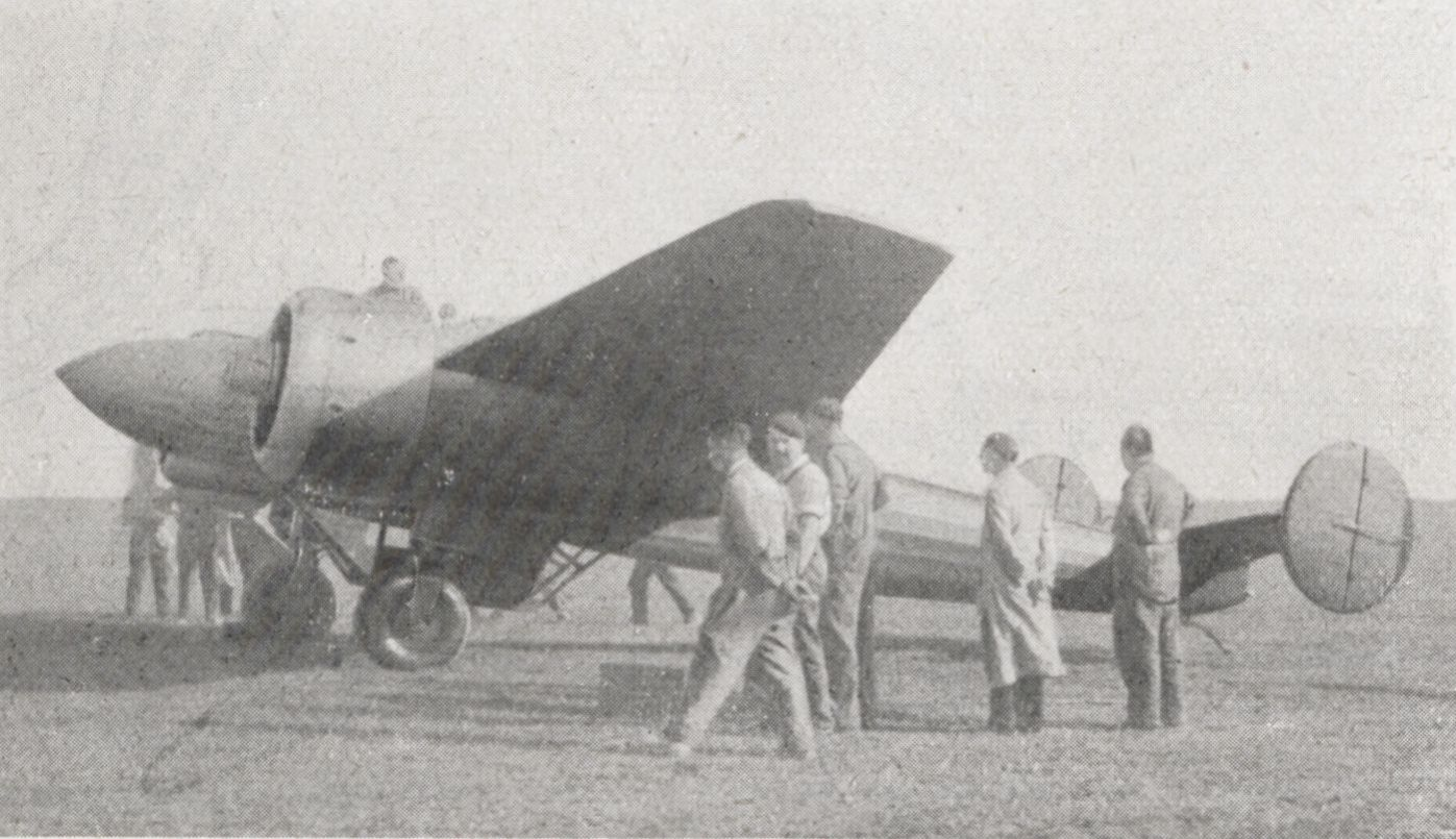 Au cours des essais du Hanriot (SNCAC) NC.510 sur le terrain de Bourges.